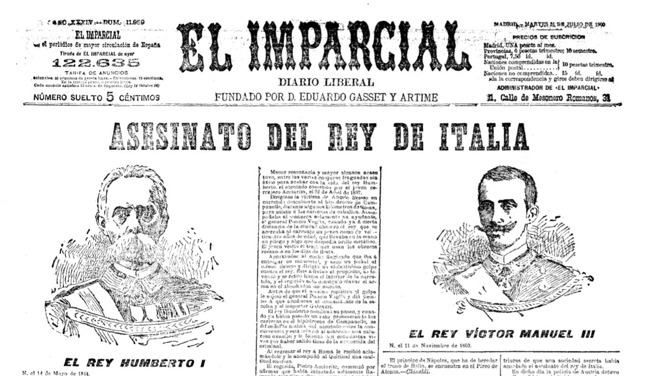 noticia del asesinato del rey de Italia Umberto I en Monza publicada por El imparcial de Madrid del dia 31.7.1900